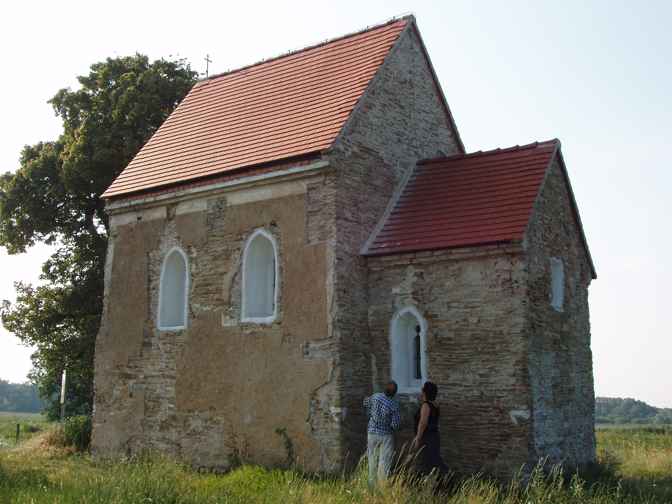 Kostol svätej Margity Antiochijskej leží pri obci Kopčany. Je to jediná dodnes stojaca zachovaná architektonická pamiatka pochádzajúca z čias Veľkej Moravy.